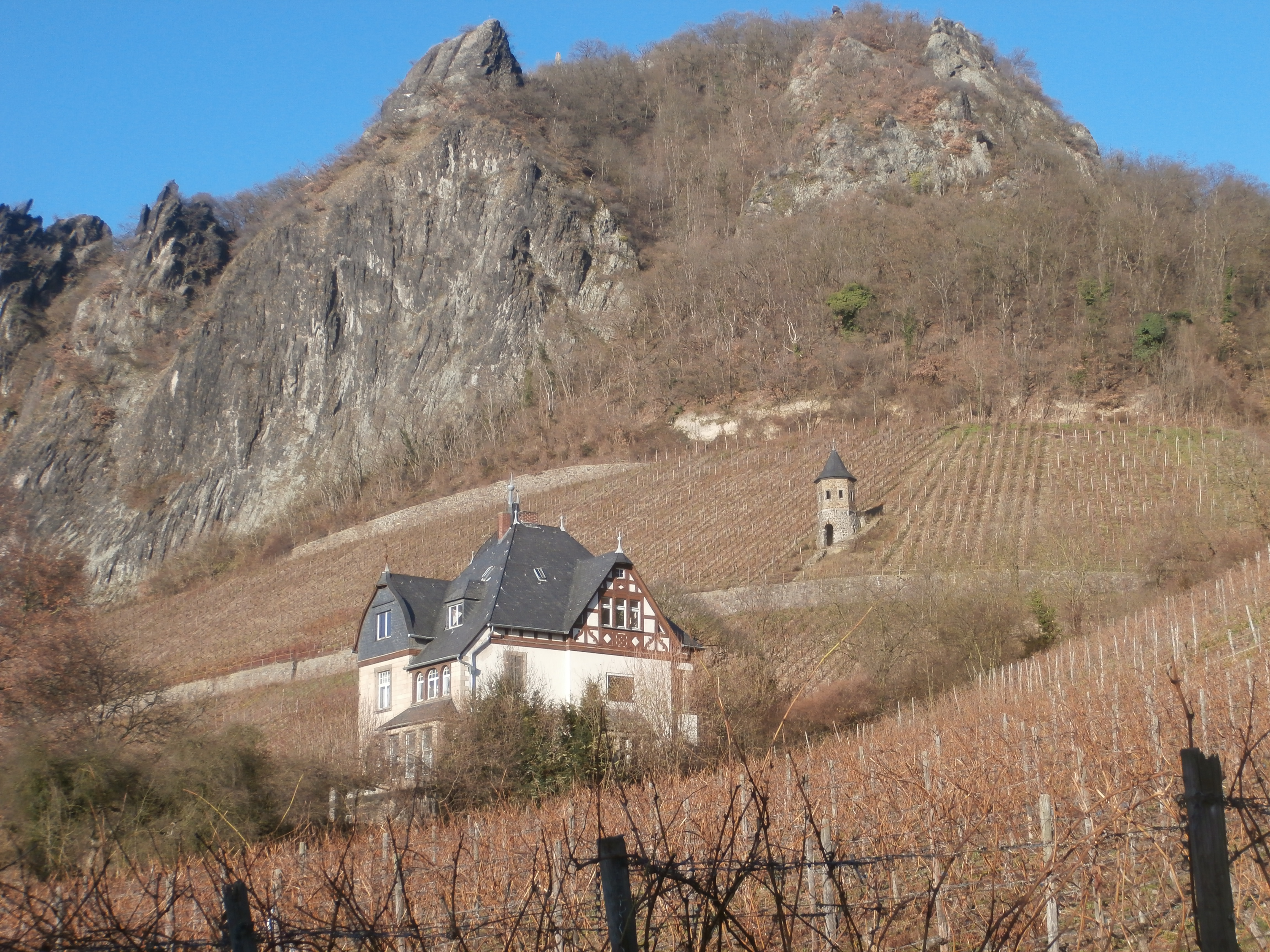 Weinberge am Südwesthang des Drachenfels, Rhöndorf, Bad Honnef